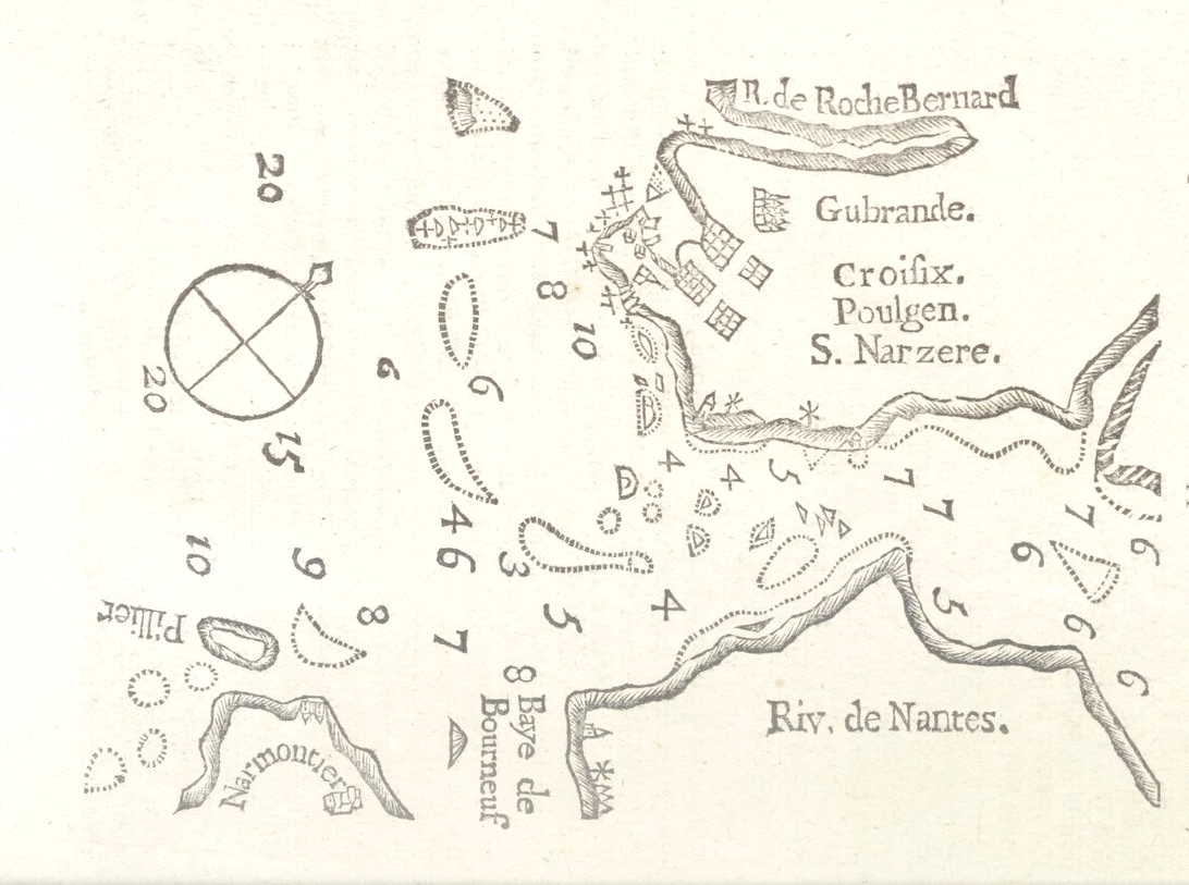 René Bougard, Le petit flambeau de la mer, 1817 : embouchure de la Loire.